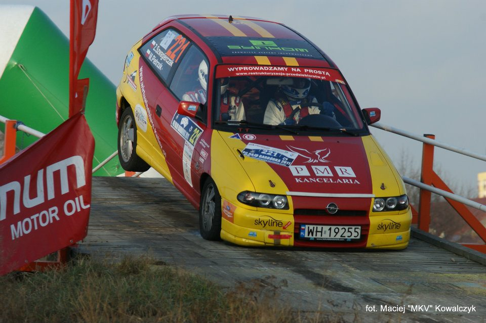 Opel Astra GSI - Szwagierczak/Pietrzak